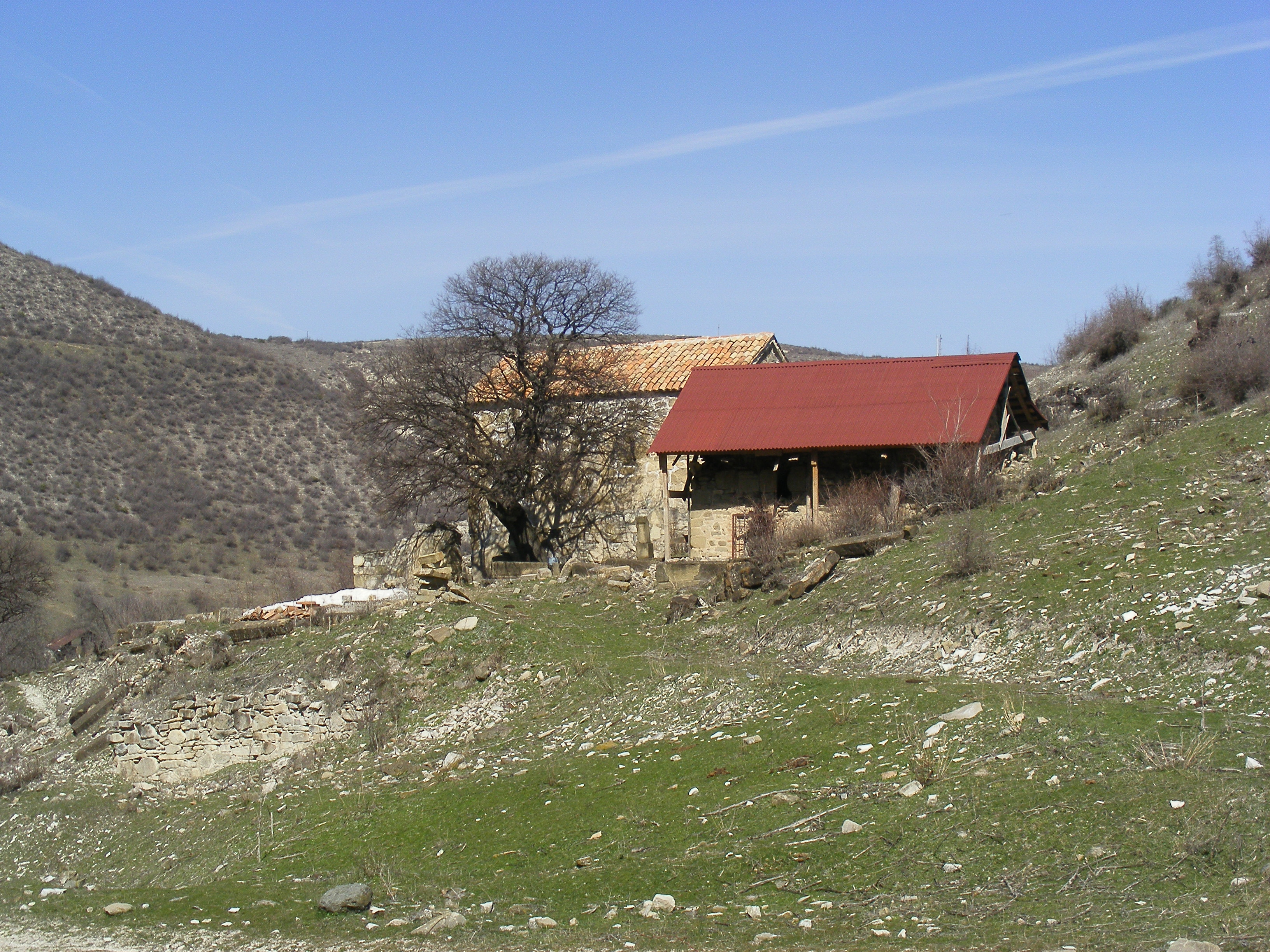 ძველი სასხორის ეკლესიები.